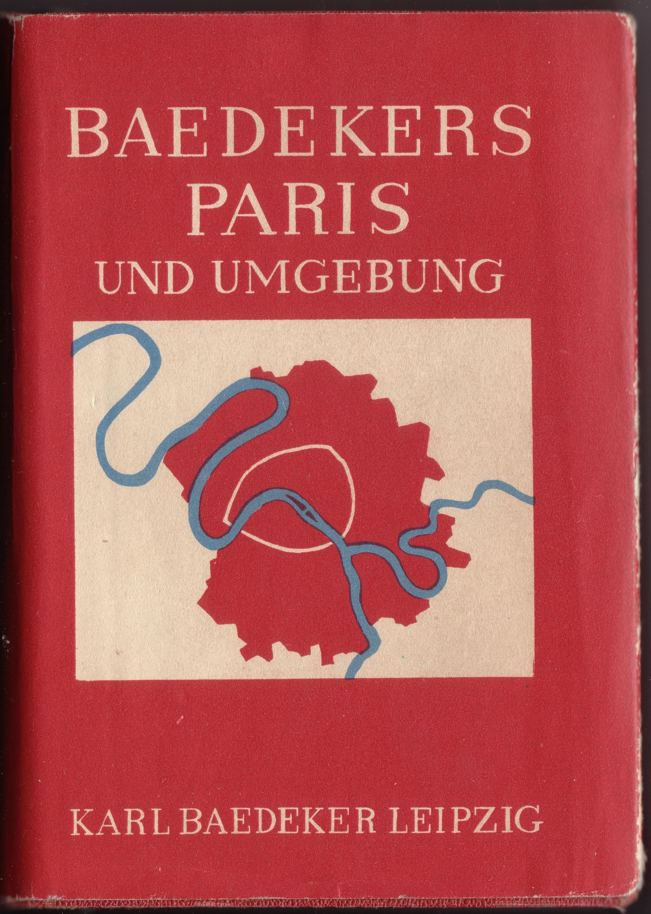 Baedeker, Paris, 20., 1931.jpg